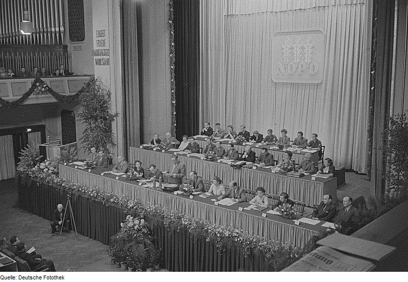 Original image description from the Deutsche Fotothek Blick auf das Podium beim NDPD-Parteitag 1950